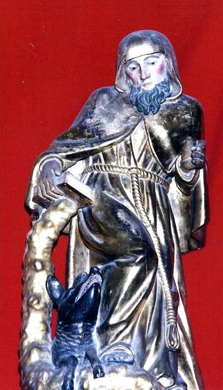 Laroque - Chapelle Saint-Jean - Saint Antoine le Grand.